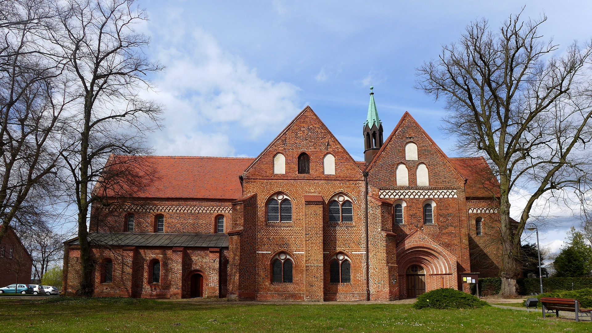 Klosterkirche Arendsee, Ansicht von der Straße Amtsfreiheit her. Aufnahmedatum 2015-04.